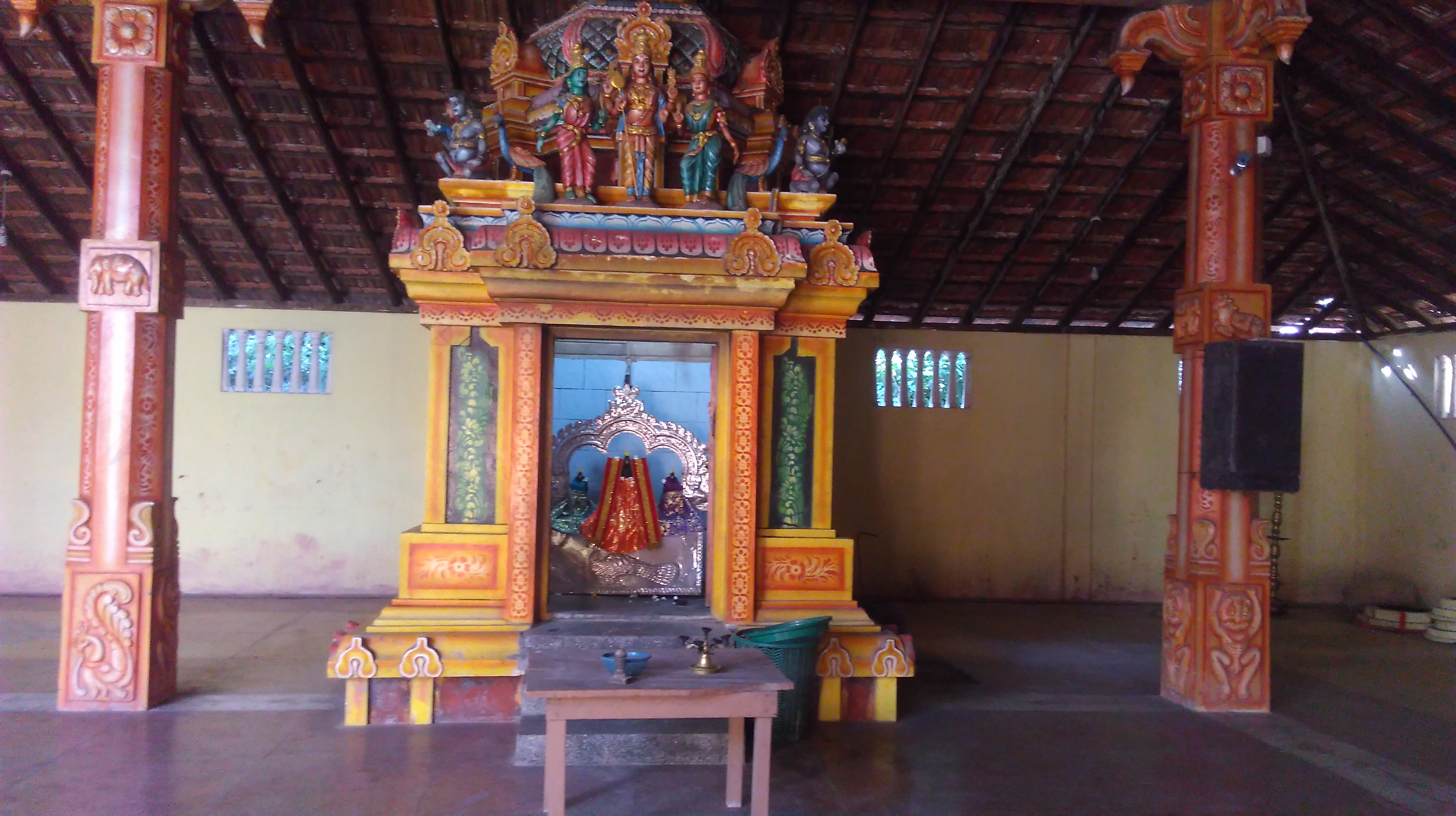 வள்ளி தெய்வயானை சமேதராய் முருகன் விக்கிரகம்